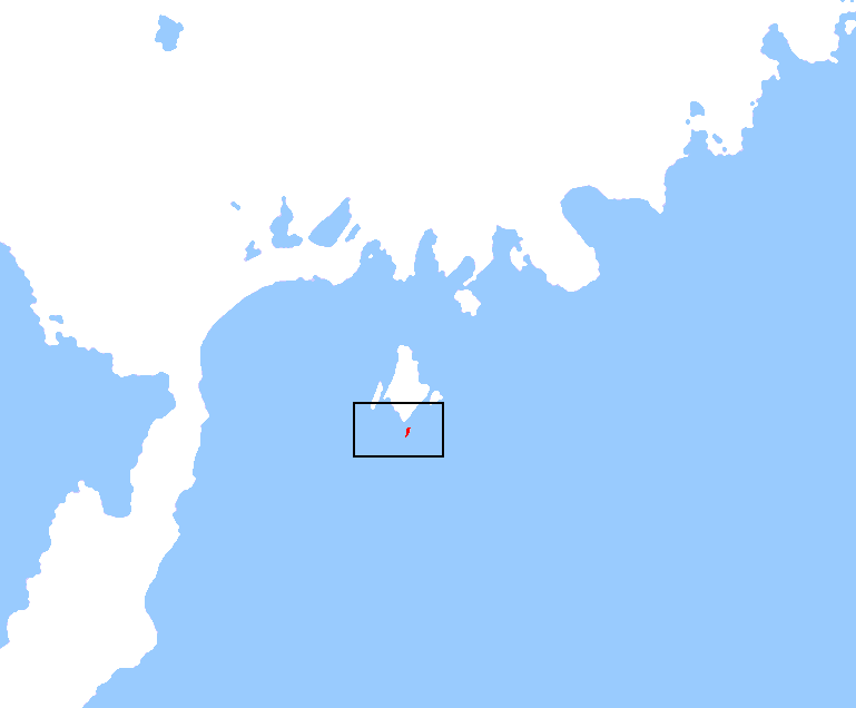 Linnusitamaa is a little island in Estonia.